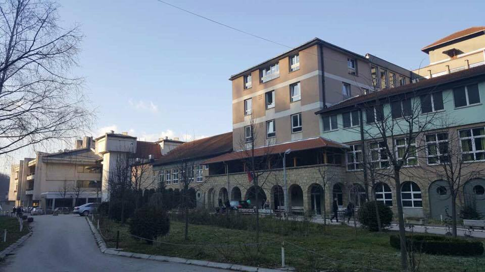 Новопазарска Бања